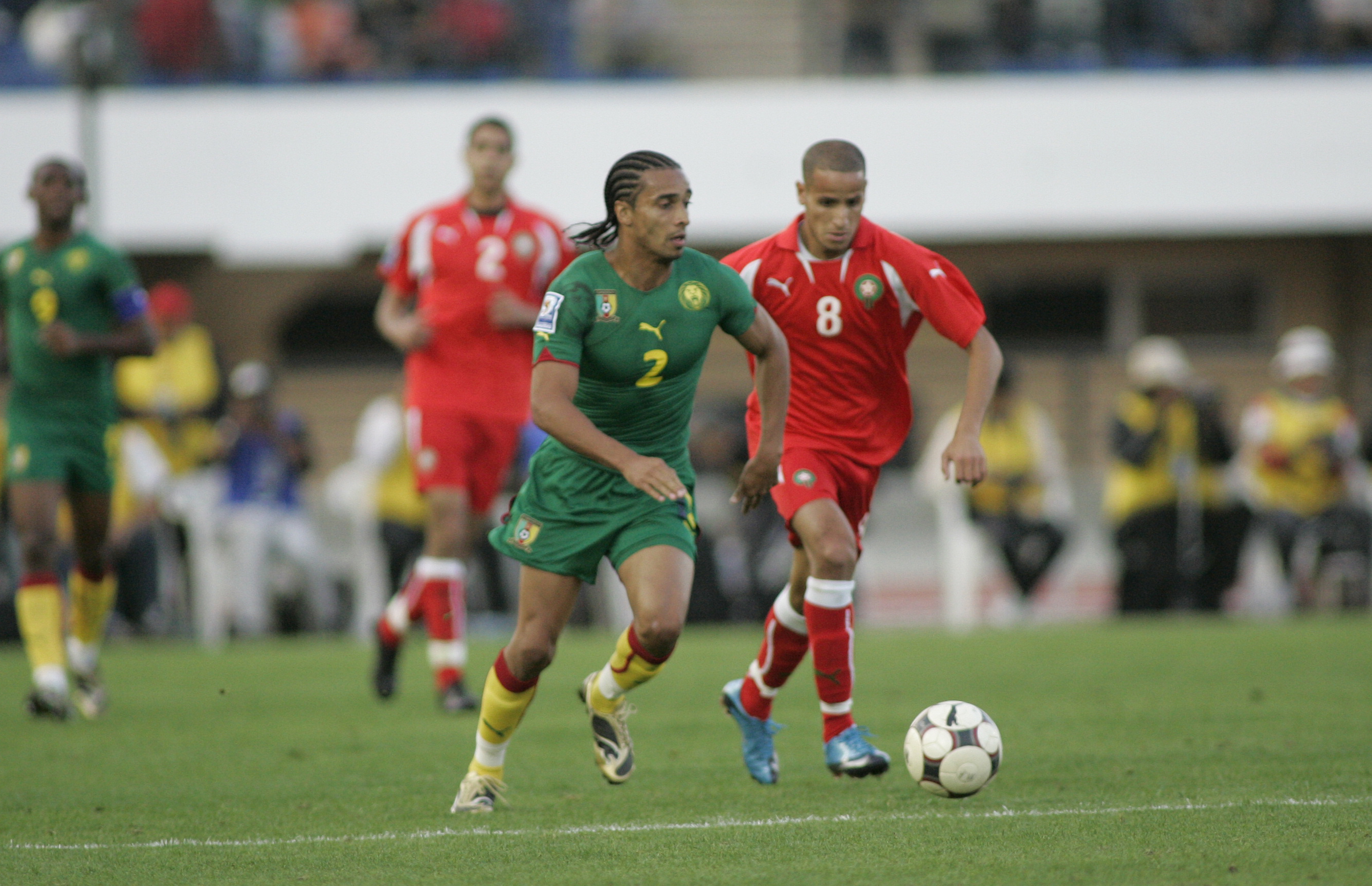 Match Maroc - Cameroun